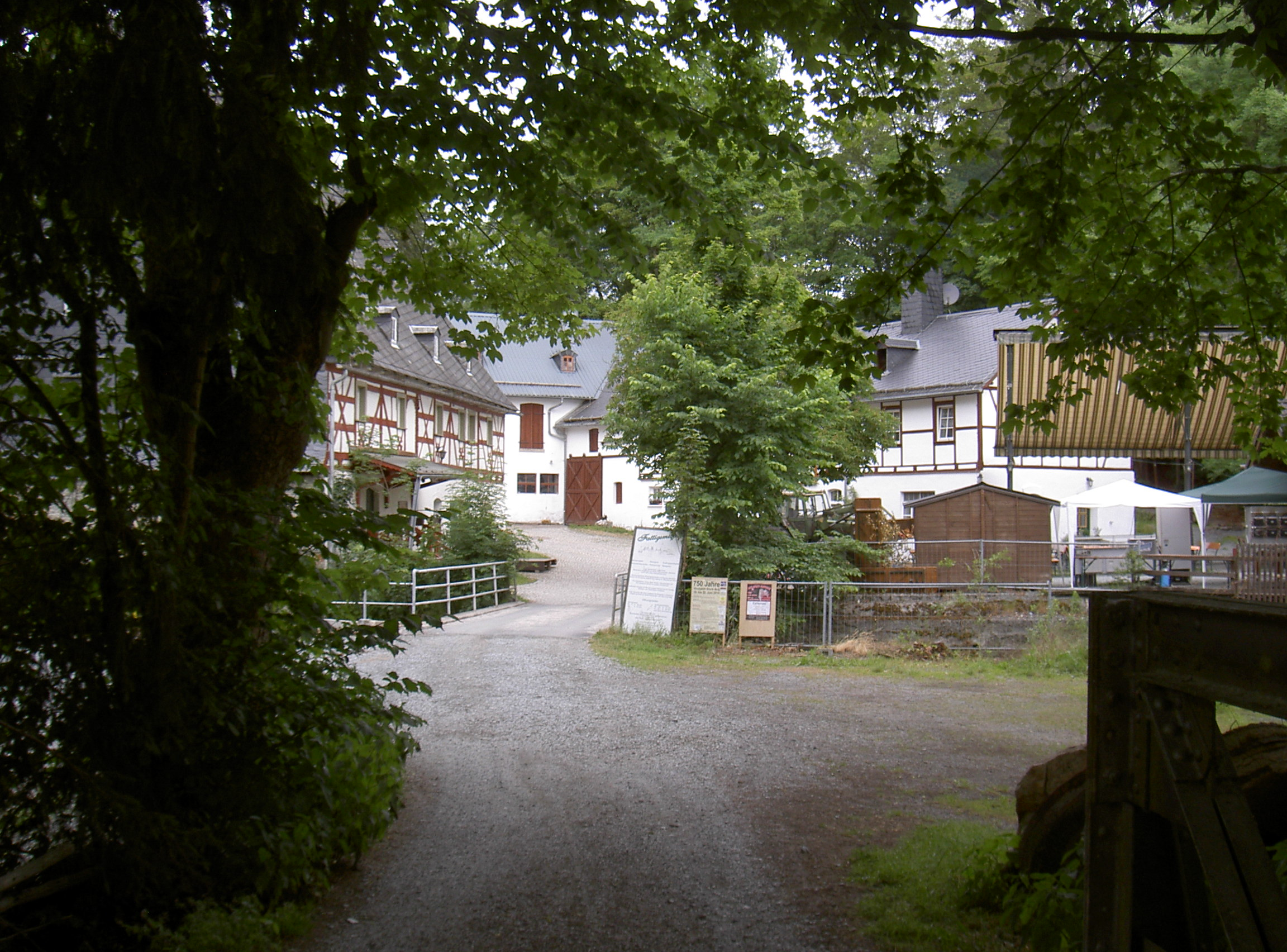 Fattigsmühle